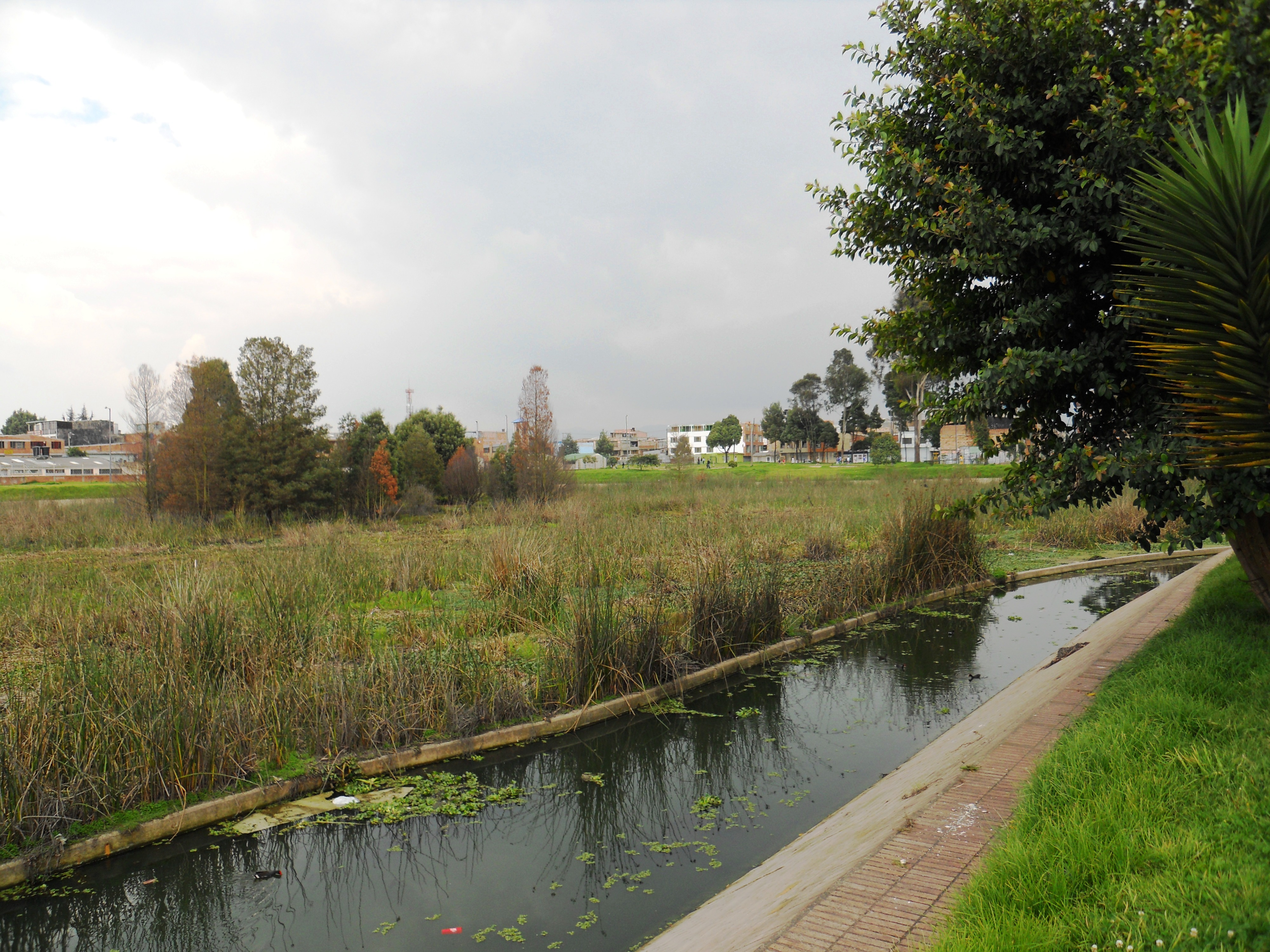 Humedal de El Jaboque en la localidad de Engativá, hacia la carrera 111 a con calle 71, al occidente de Bogotá.